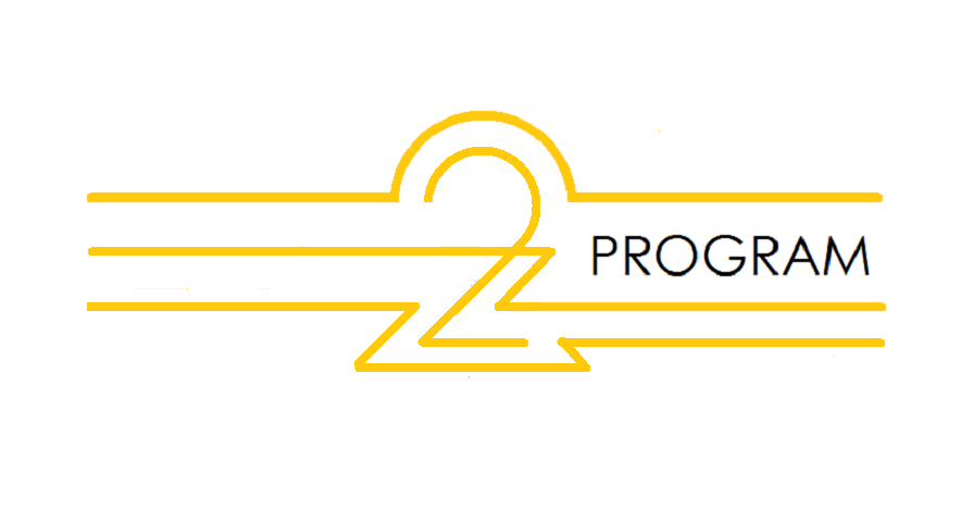 Drugie logo TVP2 używane od Nowego Roku 1981 do 29 marca 1987 roku